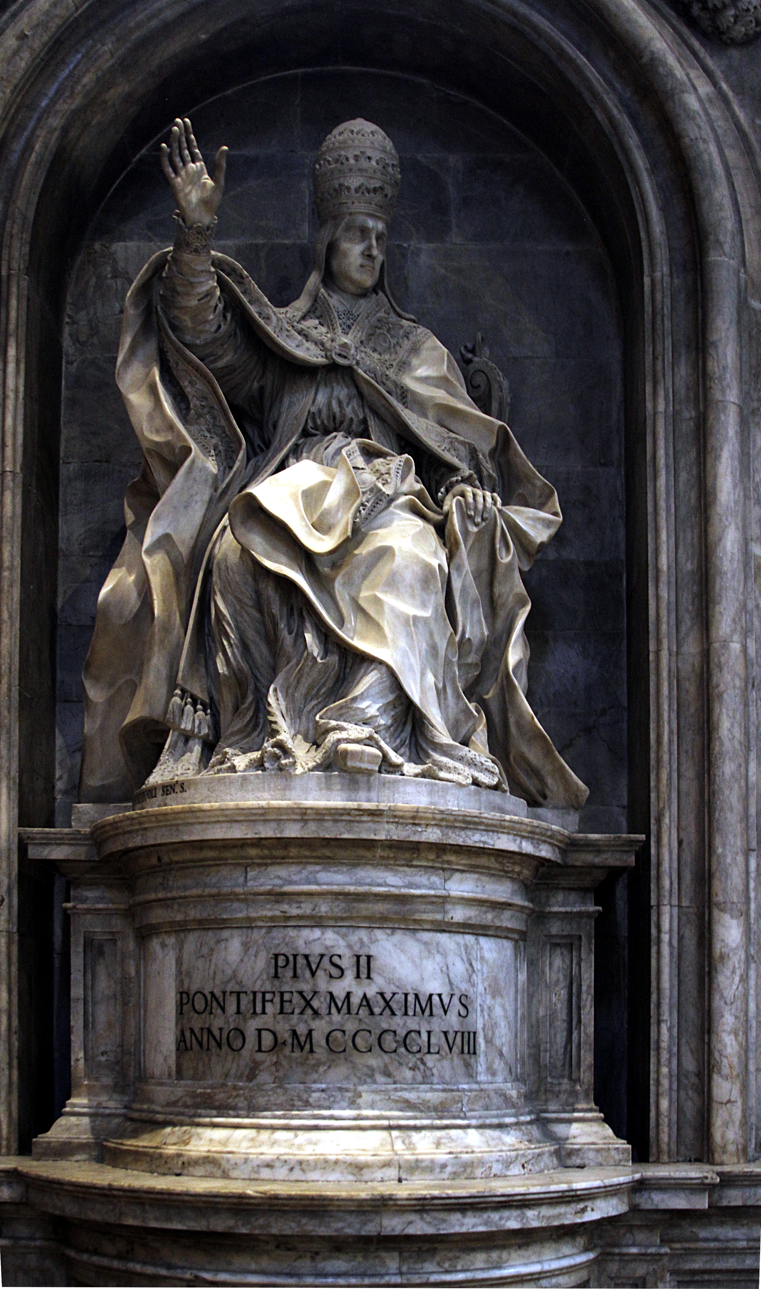 Duomo - Siena